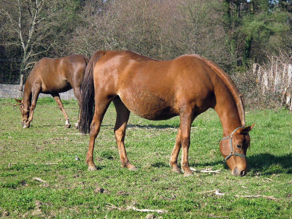 Cabalos no concello de Teo, Galicia